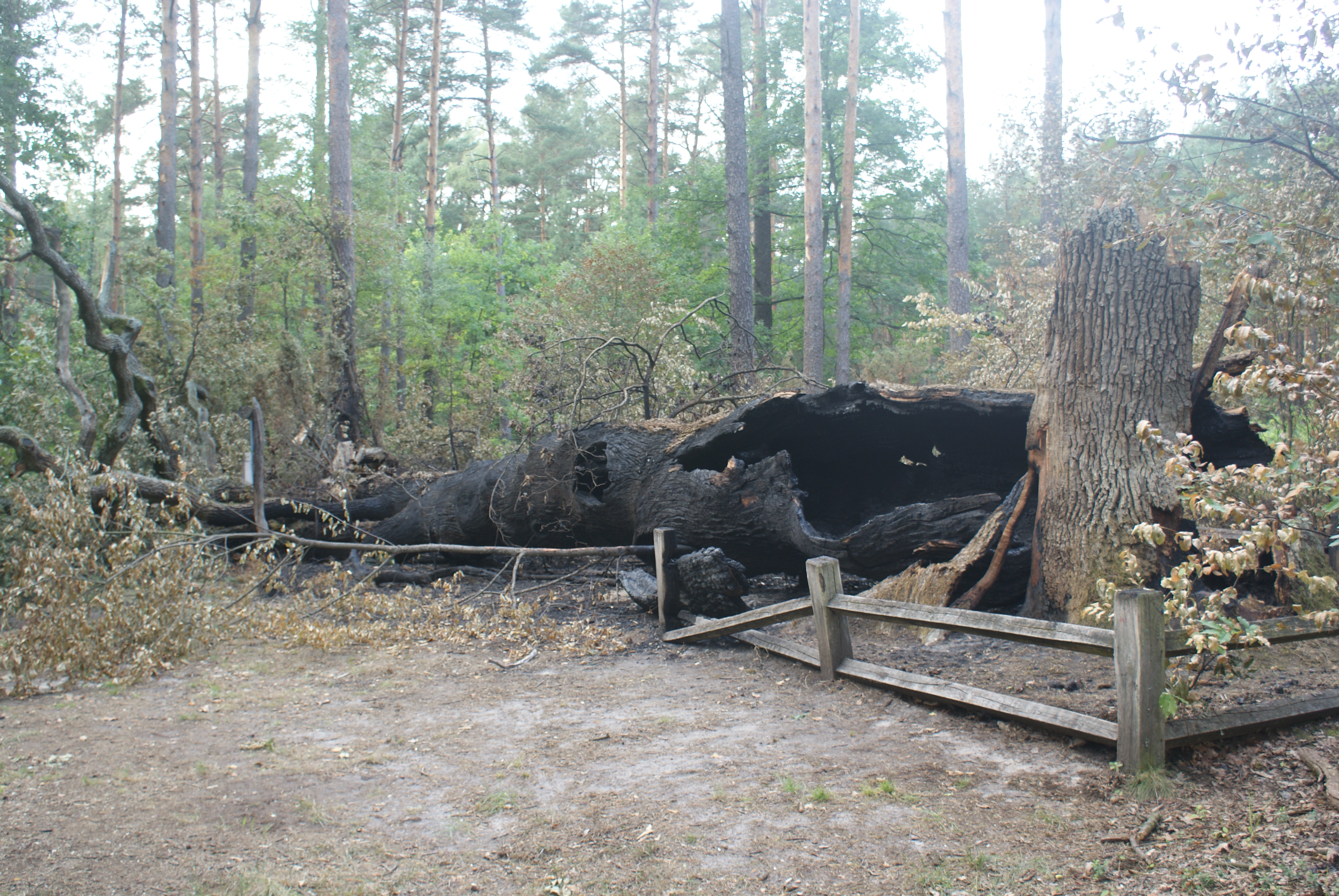 Dąb Cygański spalony